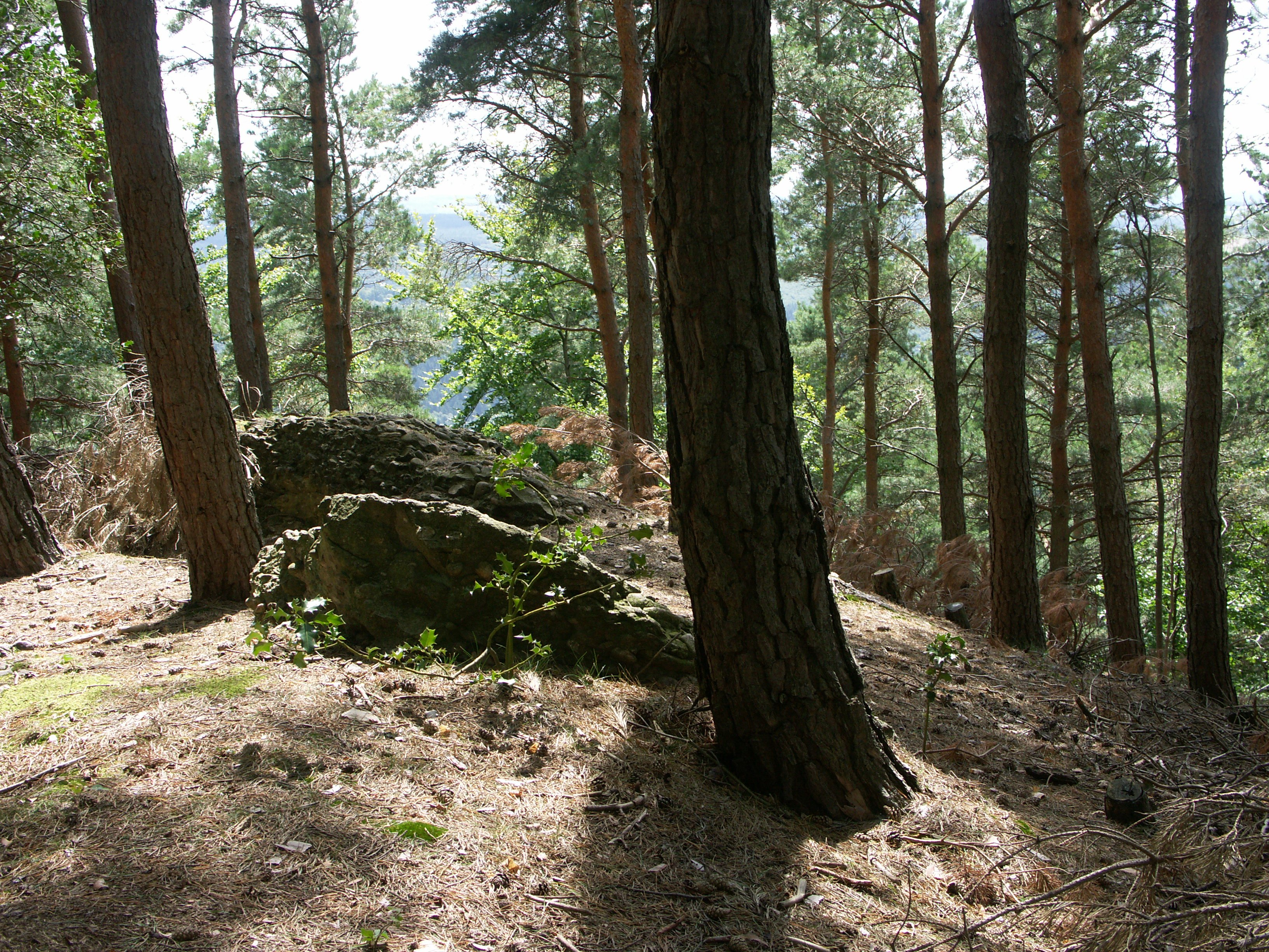 Concrete Blocks on Hill 400, Burgberg, Hürtgenwald, Germany